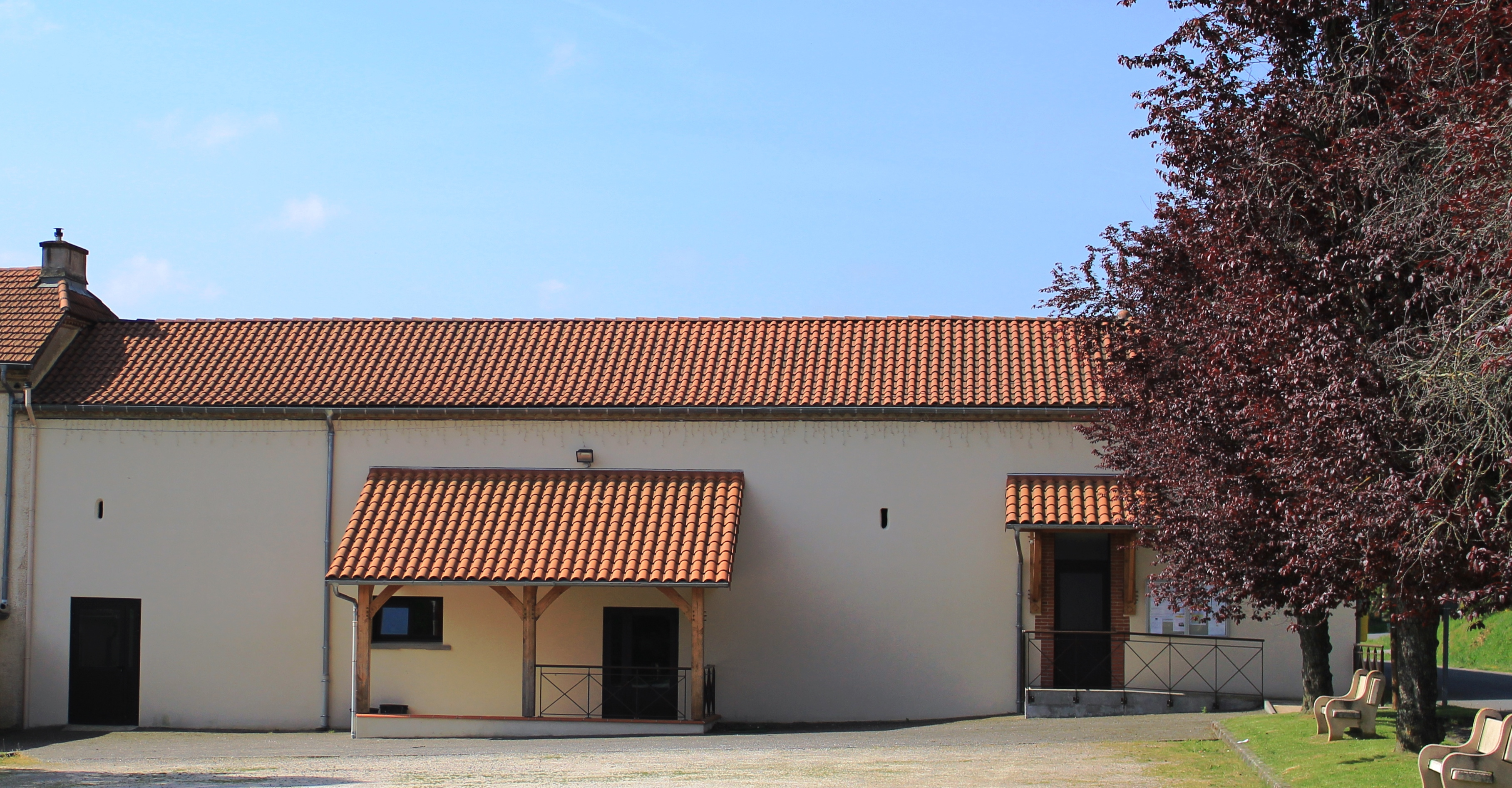 Salle des fêtes de Sanous (Hautes-Pyrénées)